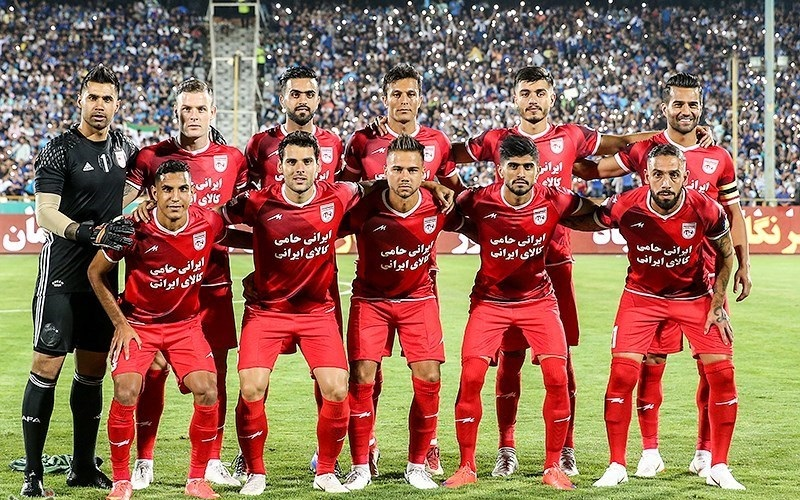 دیدار تیم‌های فوتبال استقلال تهران و تراکتورسازی تبریز در استادیوم آزادی تهران برگزار شد که در این دیدار تیم استقلال با نتیجه ۳ بر صفر حریف خود را شکست داد.